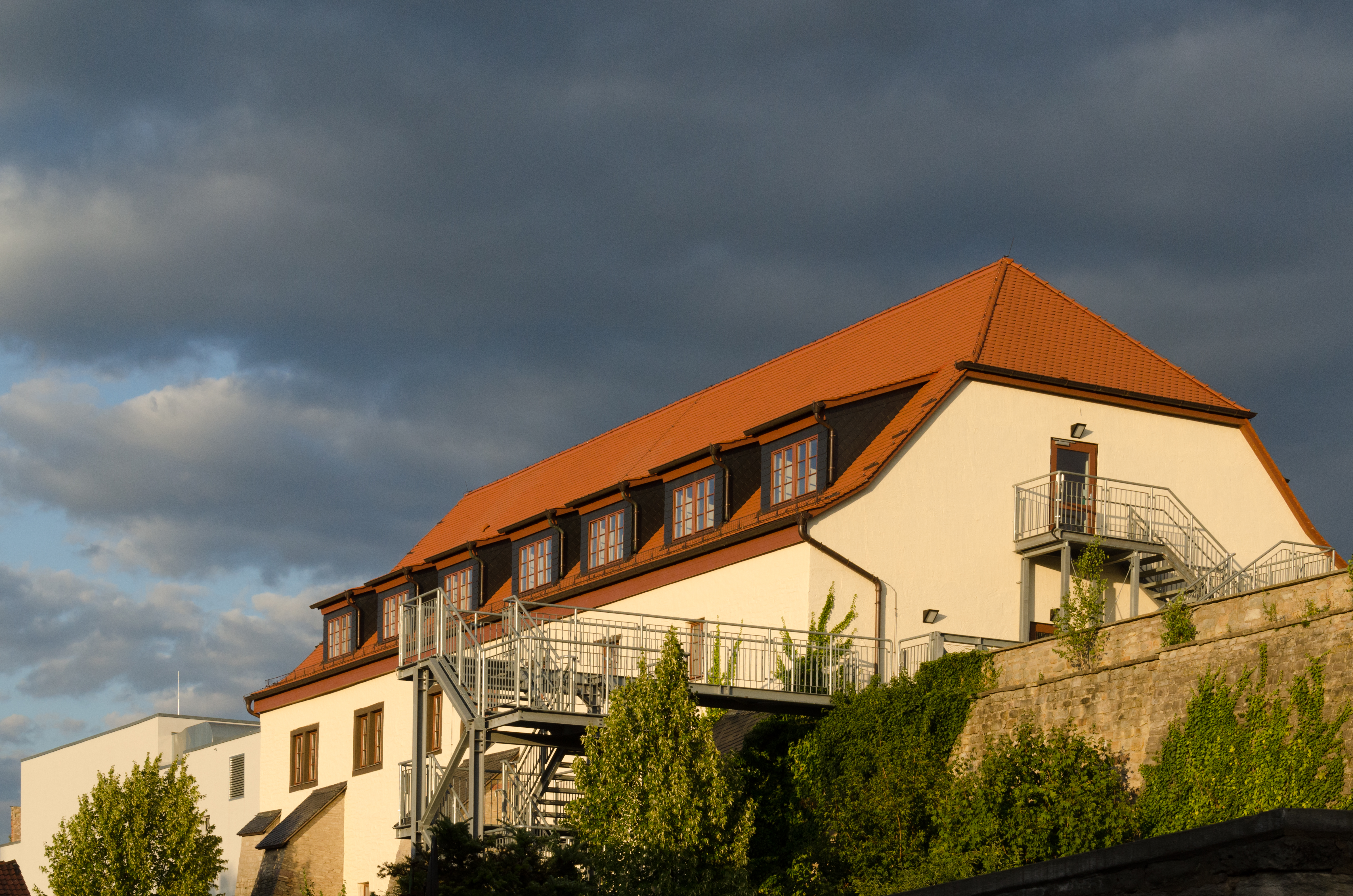 Sangerhausen, Alter Markt 34